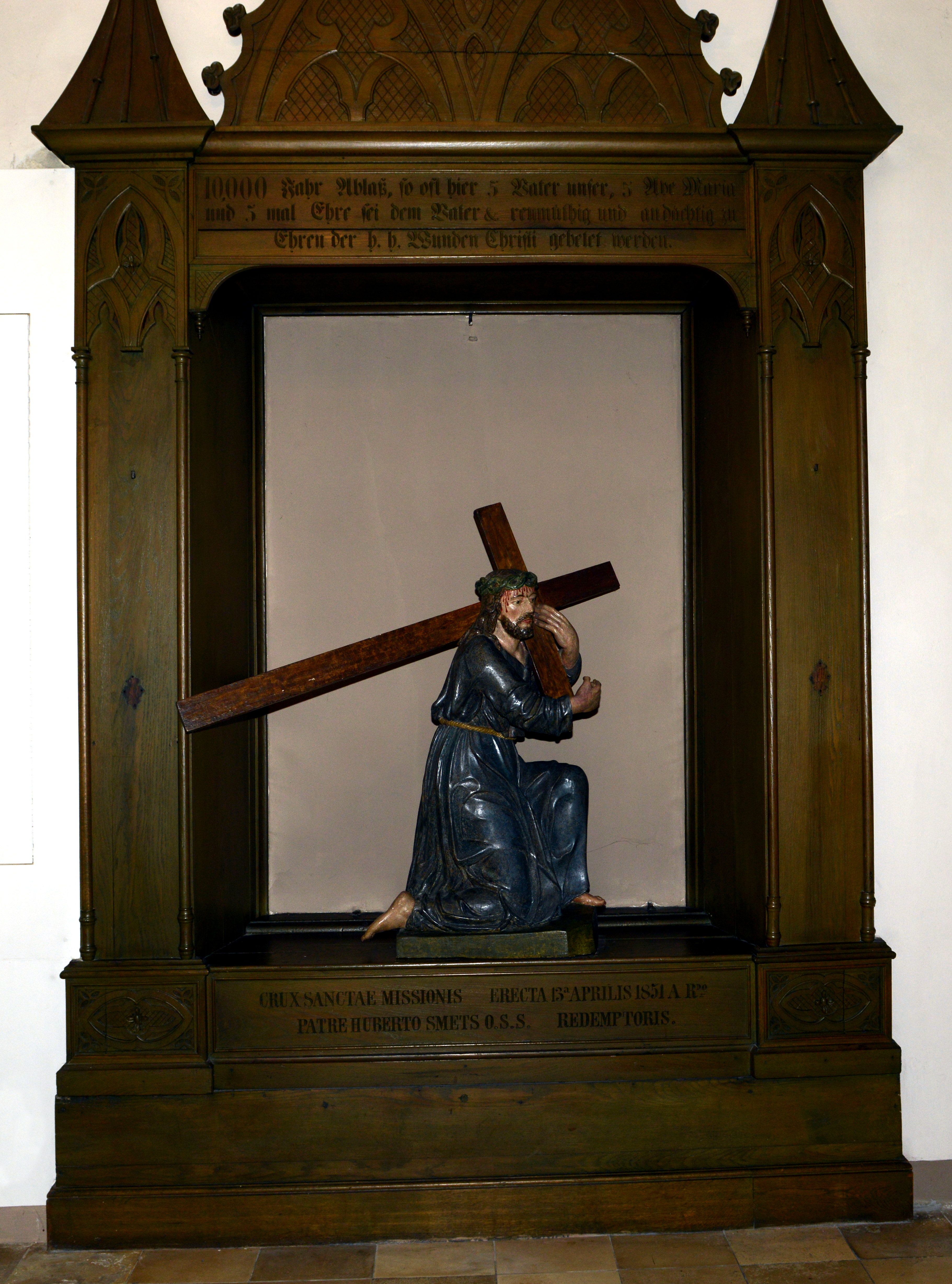 D'Missiounskräiz vun 1851 steet lénks bei der Entree an der Kierch am Stadgronn.